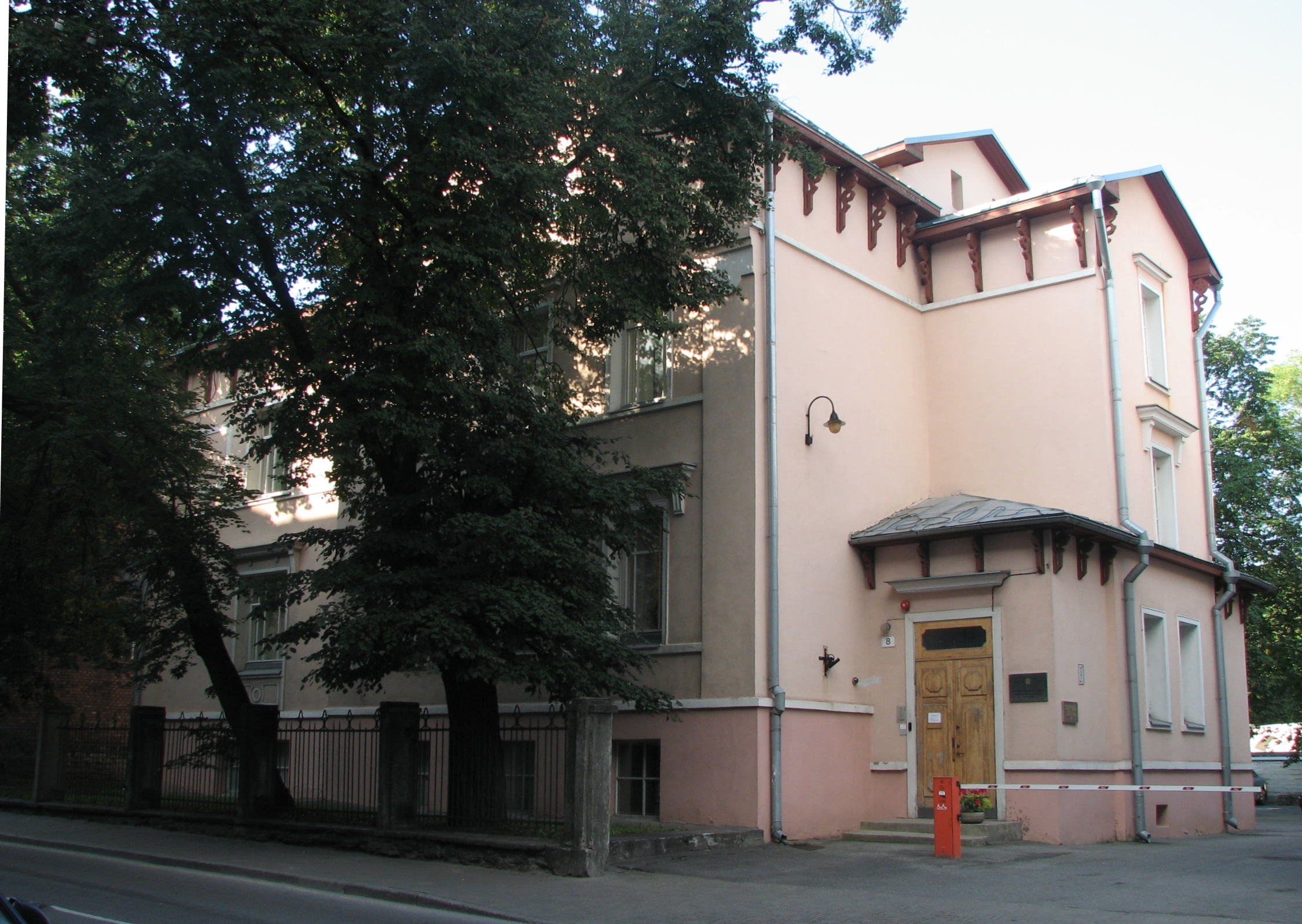 Maja, kus aastatel 1886-1914 asus pimedate kool-varjupaik. Kesklinna linnaosa, Tõnismägi 8.